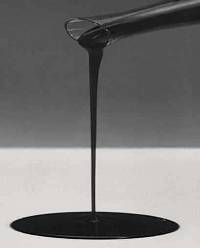 Водовугільне паливо (ІІІ класс)